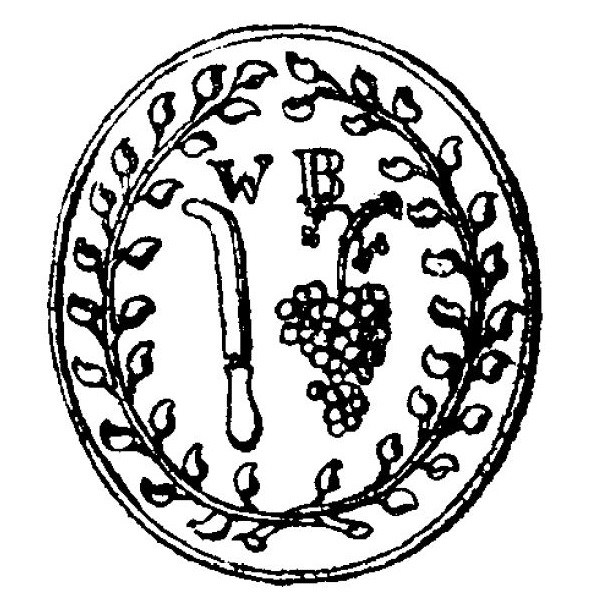 Jediná dochovaná obecní pečeť pochází z roku 1824